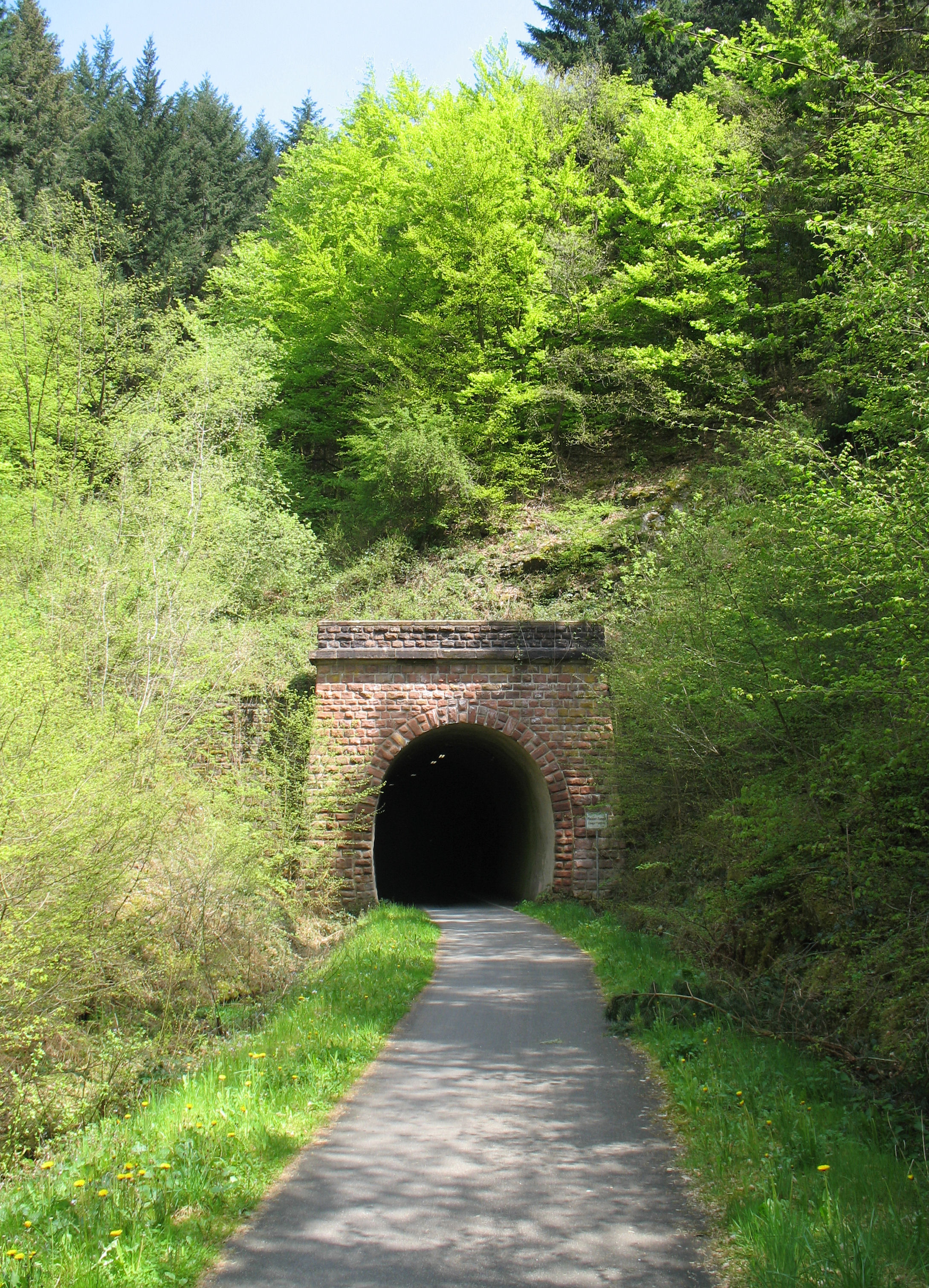 Südliches Ende des Pleiner-Tunnel auf dem Maare-Mosel-Radweg